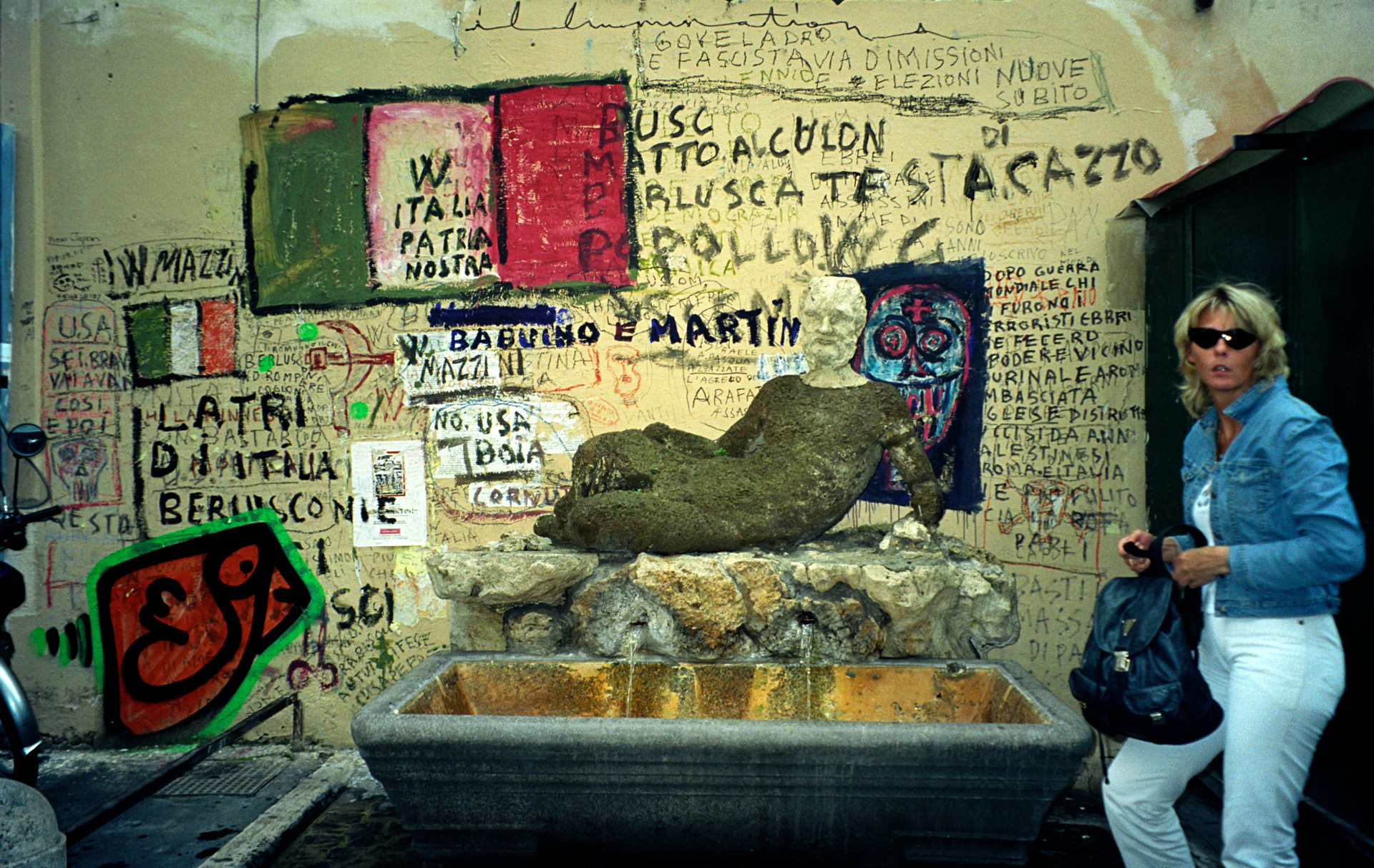 Roma, fontana del Sileno, "Babuino"